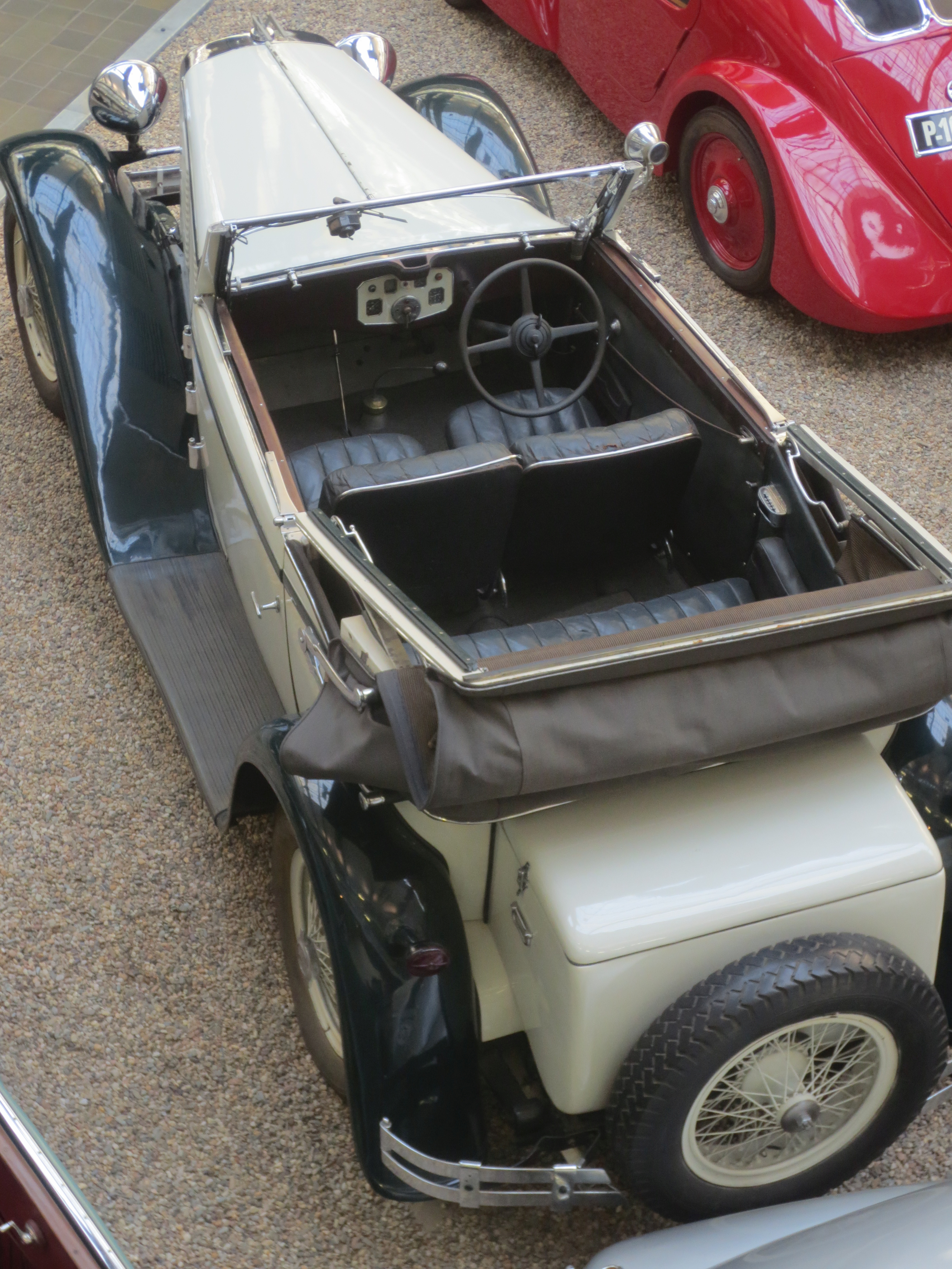 Walter Standard 6 (1931), kabriolet karosovaný firmou Petera, NTM 2020